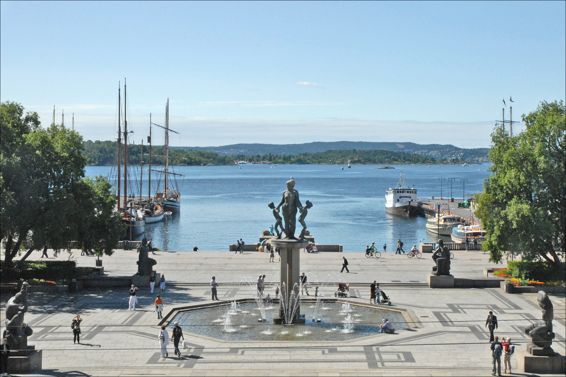 La place et le fjord d'Oslo devant l'hôtel de ville.